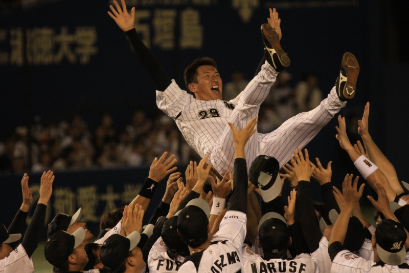 日本プロ野球 千葉ロッテマリーンズ 小野晋吾投手 引退セレモニーでの胴上げ